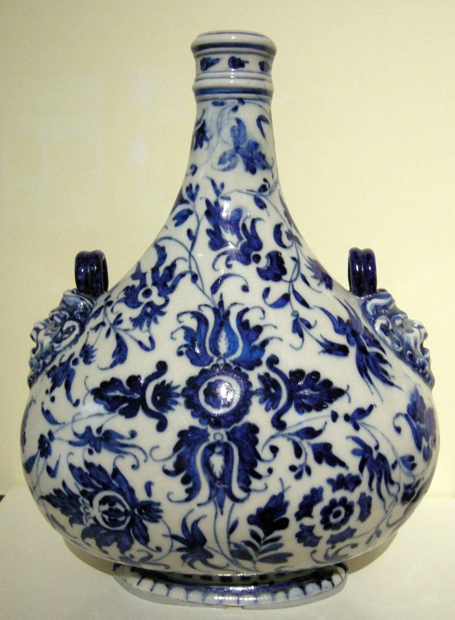 Cafaggiolo maiolica, fiasca da pellegrino con decorazione blu, anni 1580